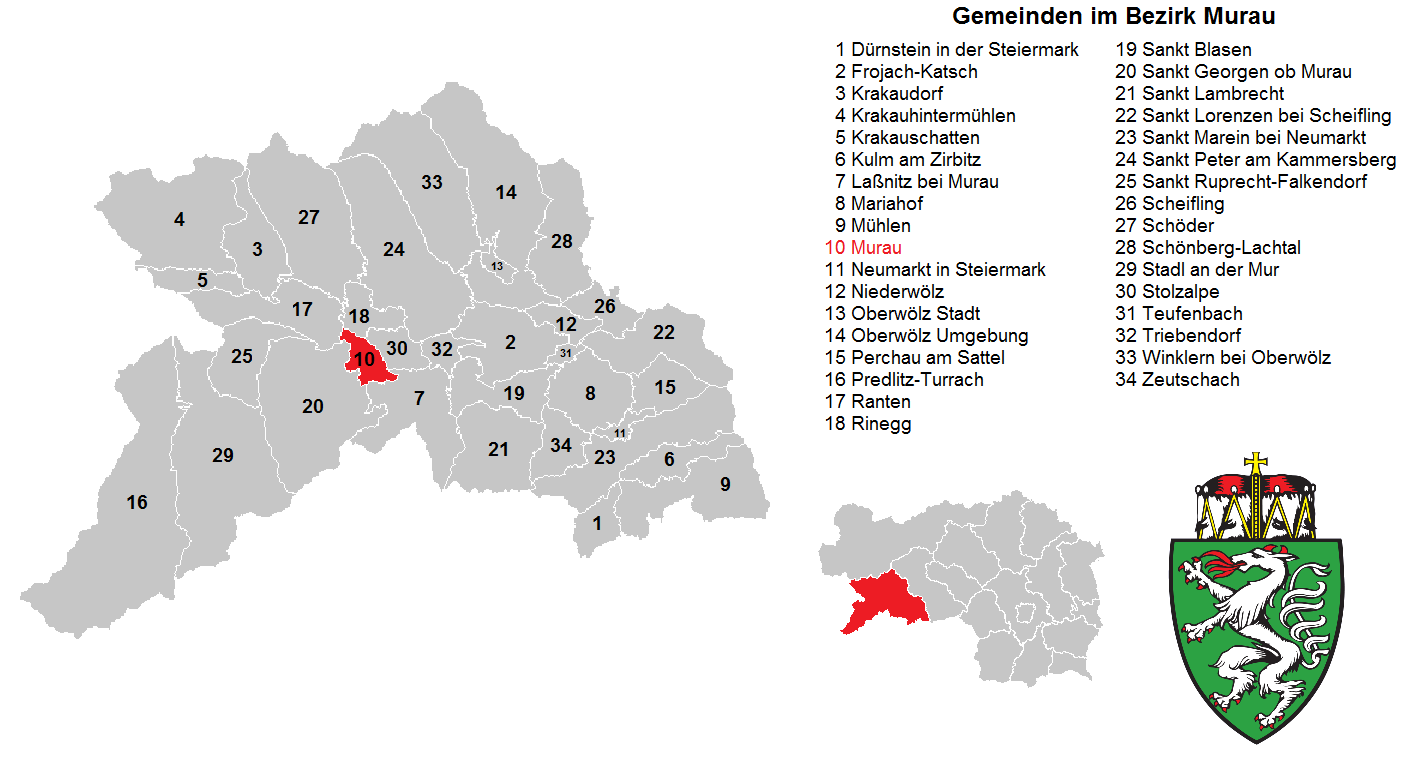 Bezirk Murau